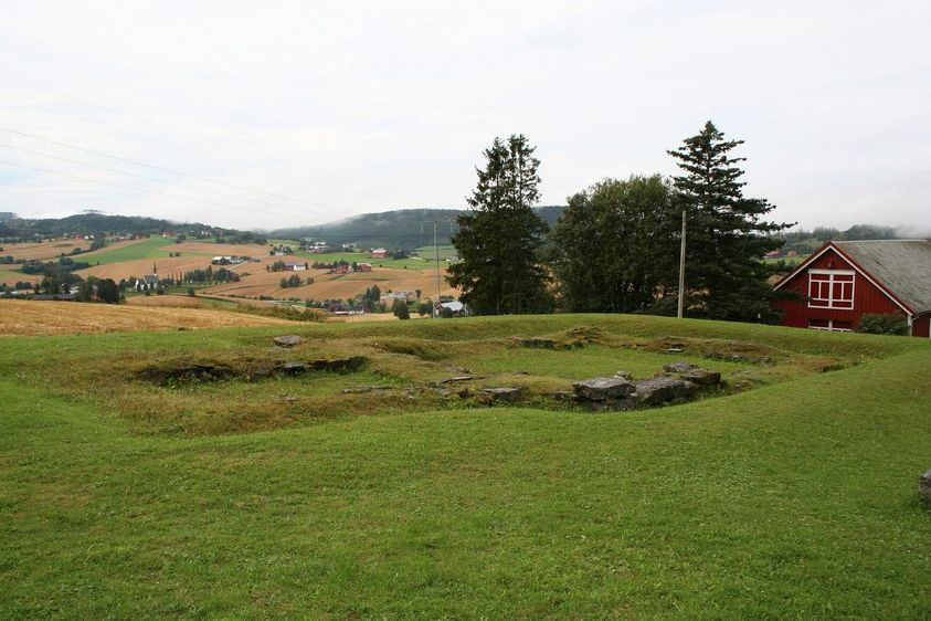 Husaby (eller Huseby) kirkeruin i Skaun